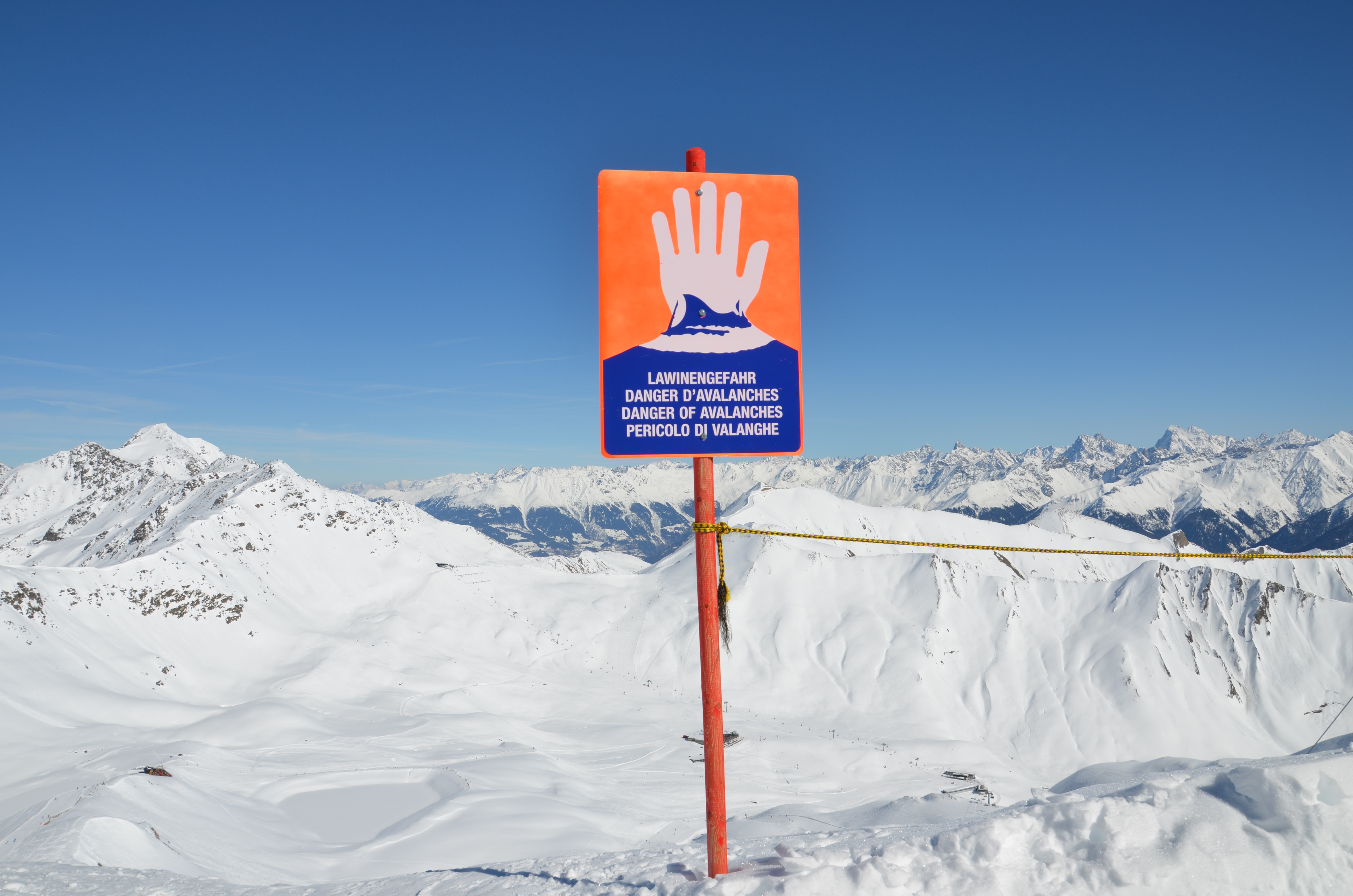 Ein Lawinenwarnschild im Skigebiet Serfaus-Fiss-Ladis